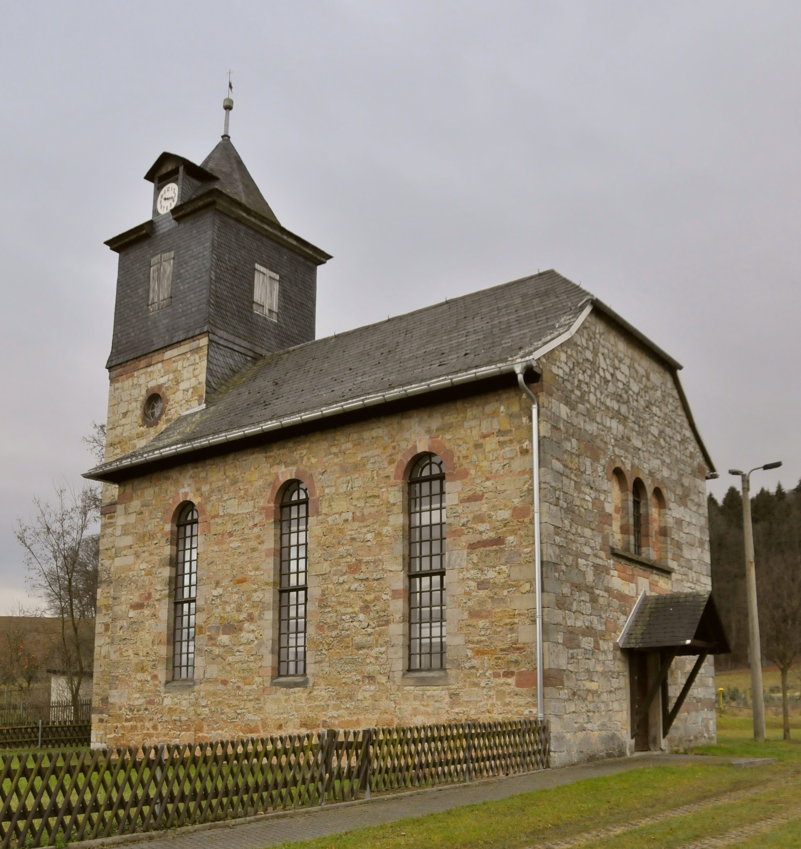 Nauenburg, Kirche